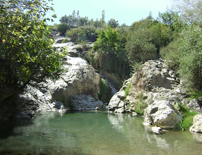 Le Sart çayi (ancien Pactole) en Turquie